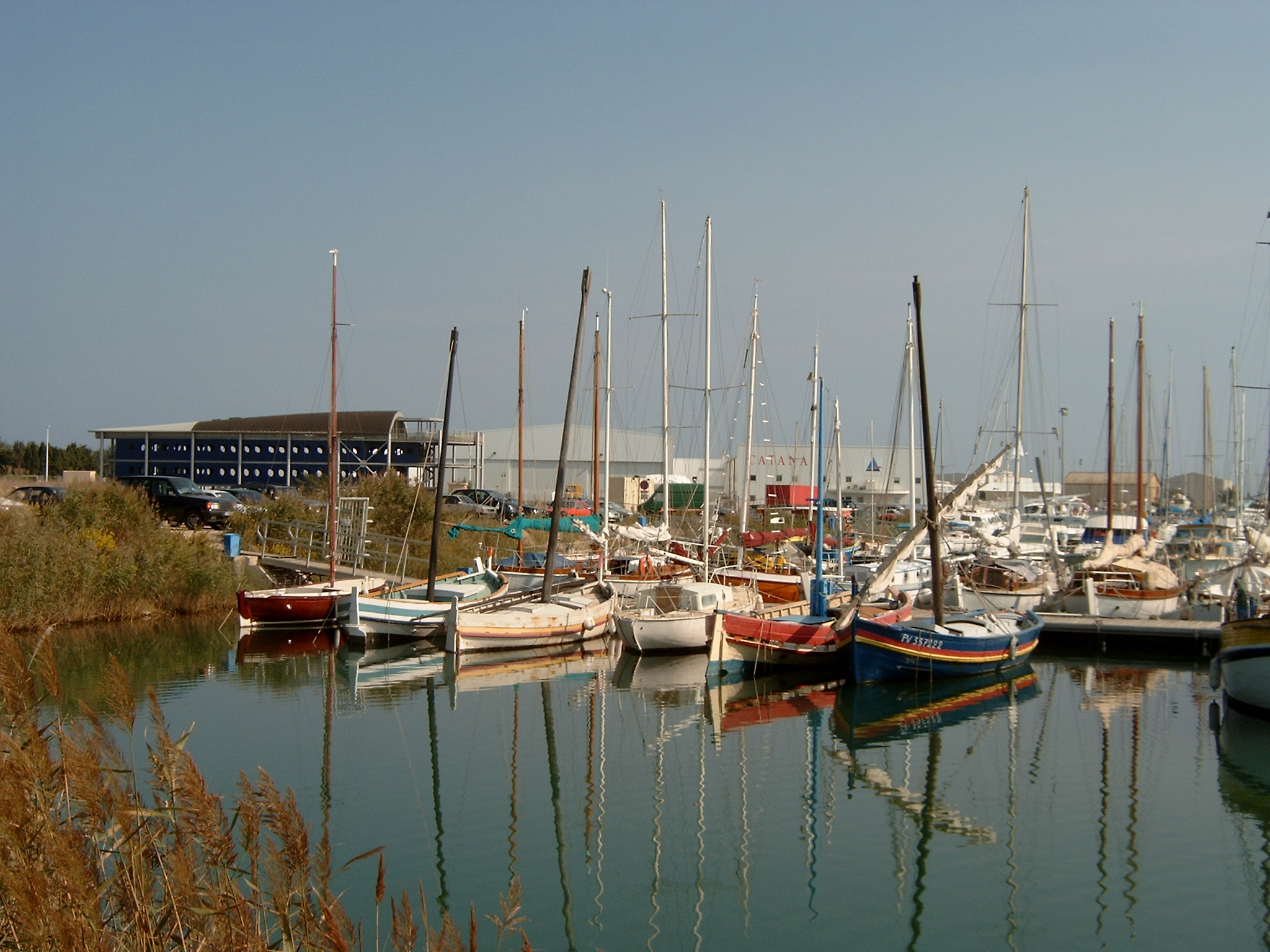 Photo perso du port des vieux gréements 2004. Canet-en-Roussillon, Pyrénées-Orientales, France